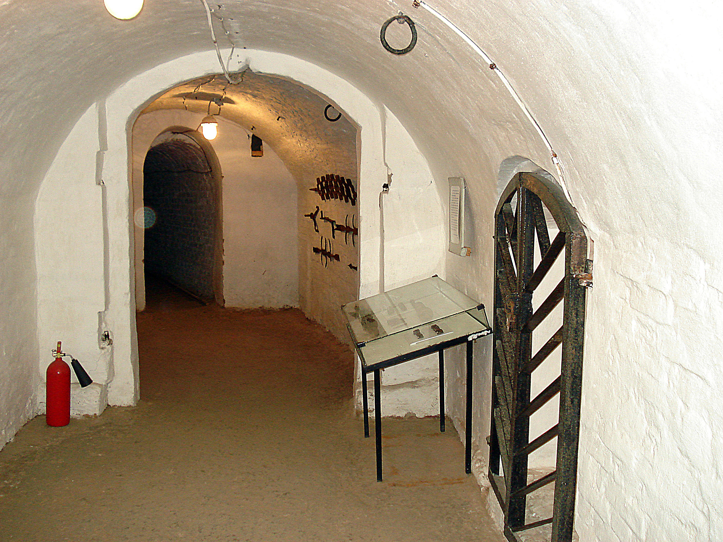 Таможенная застава. исторический центр города (Ростовская область, Аксай, посёлок берданосовка, грушевская улица, 8)